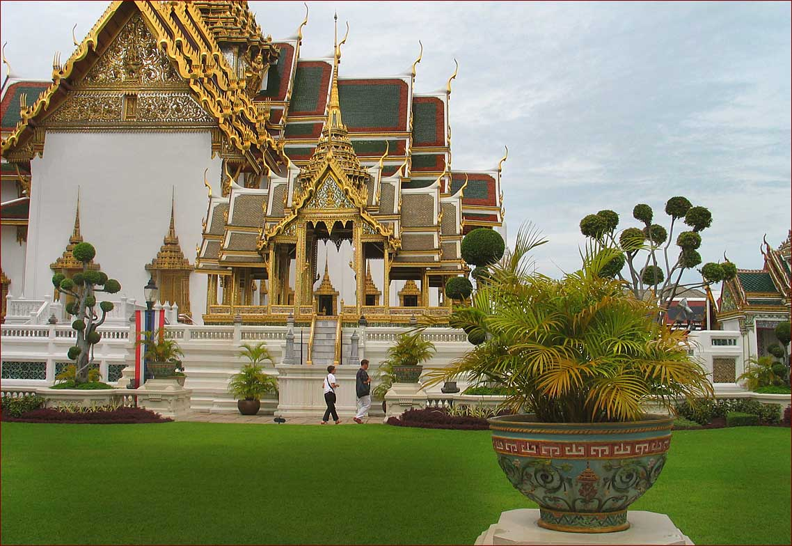 Phra Tinang Aporn Phimok Prasat pavillon, Grand Palace, Bangkok, Thailand